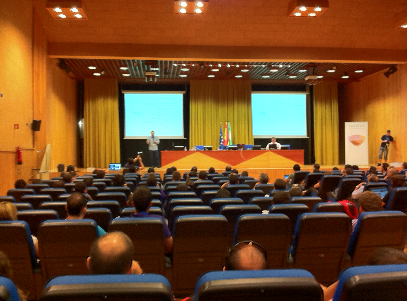 Drupalcamp Spain 2011